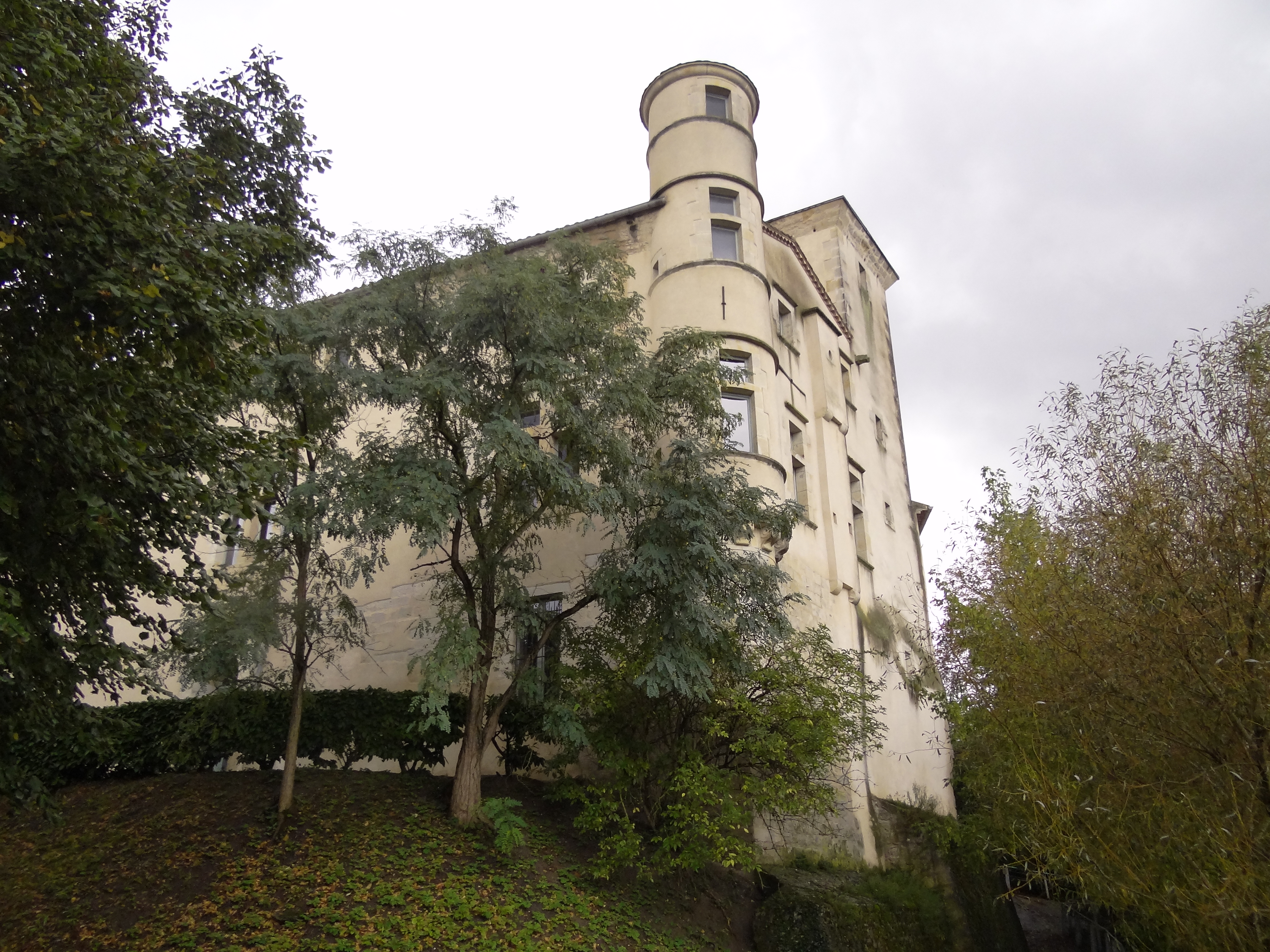 Château de Labruguière (Inscrit) .